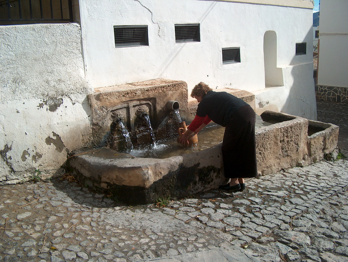 Fuente de los Tres Caños, en el municipio de Almócita.